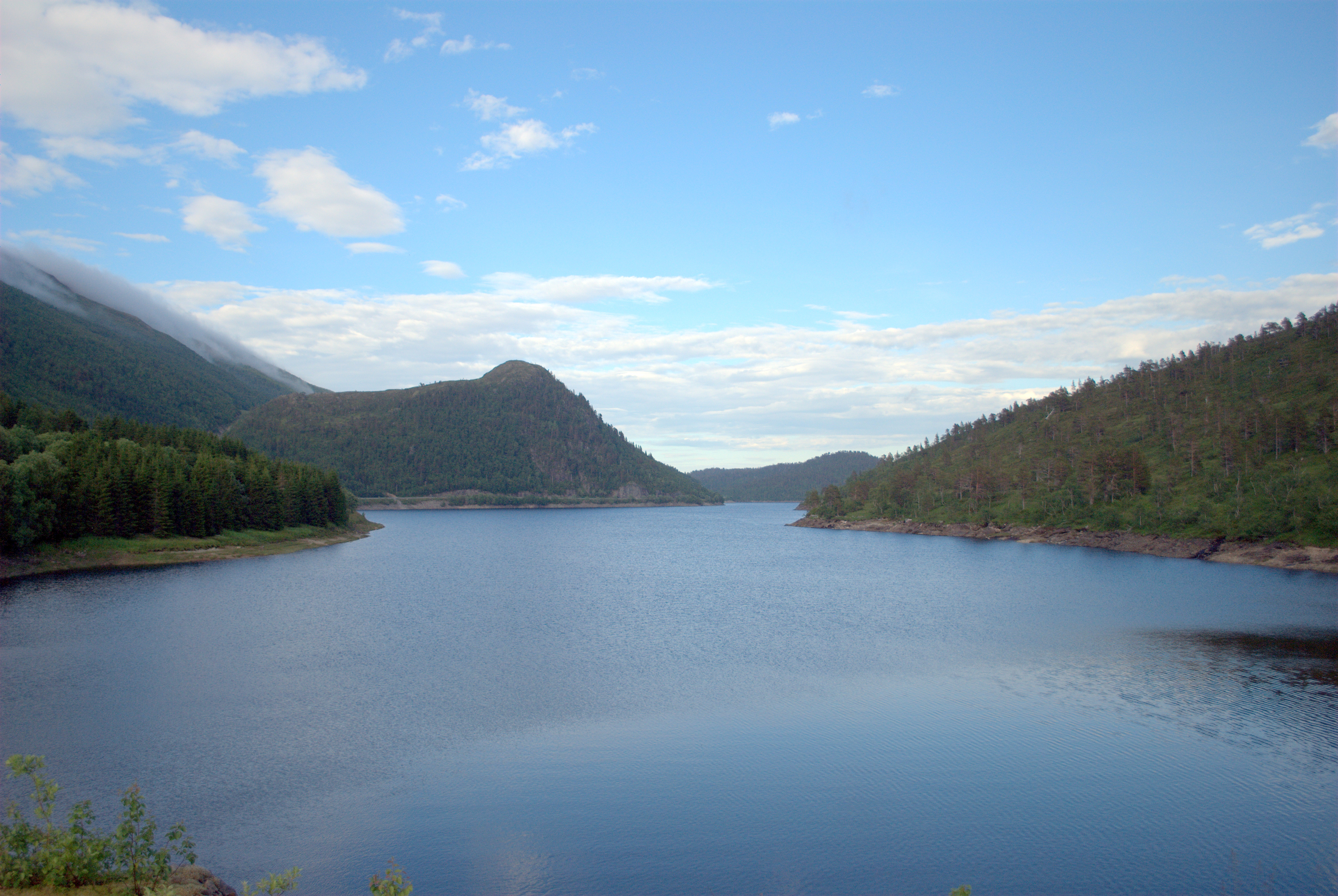 Vasslivatnet i Hemne kommune i Sør-Trøndelag sett mot østlig retning.